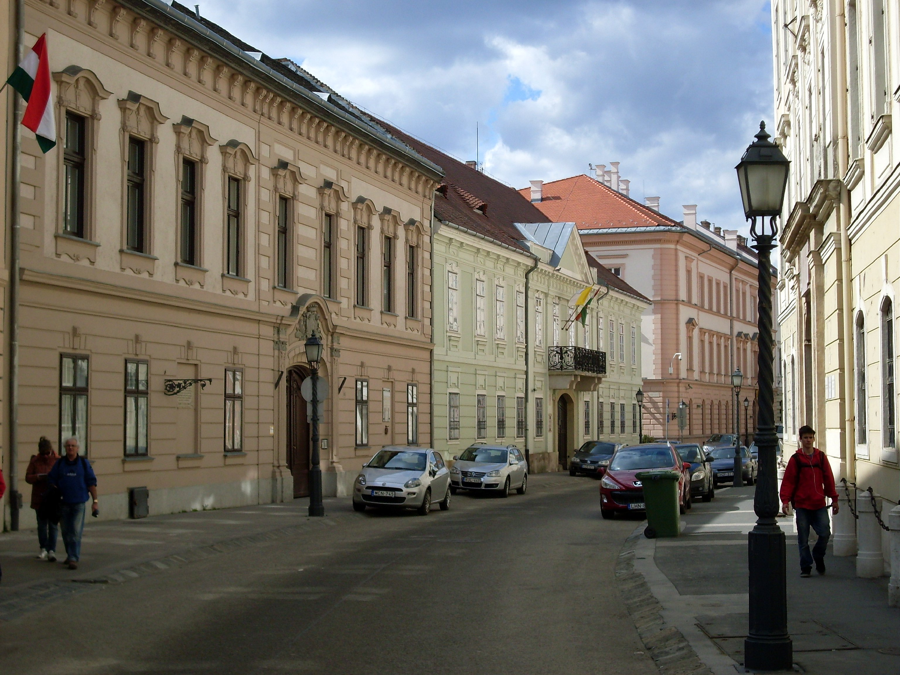 Foto genomen in Boedapest, april 2013